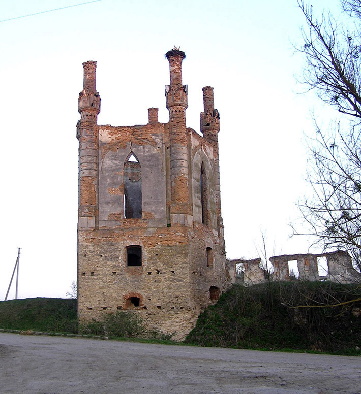 Руїни замку в селі Новомалин Острозького району Рівненської області